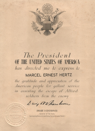 תעודת כבוד מהקונגרס